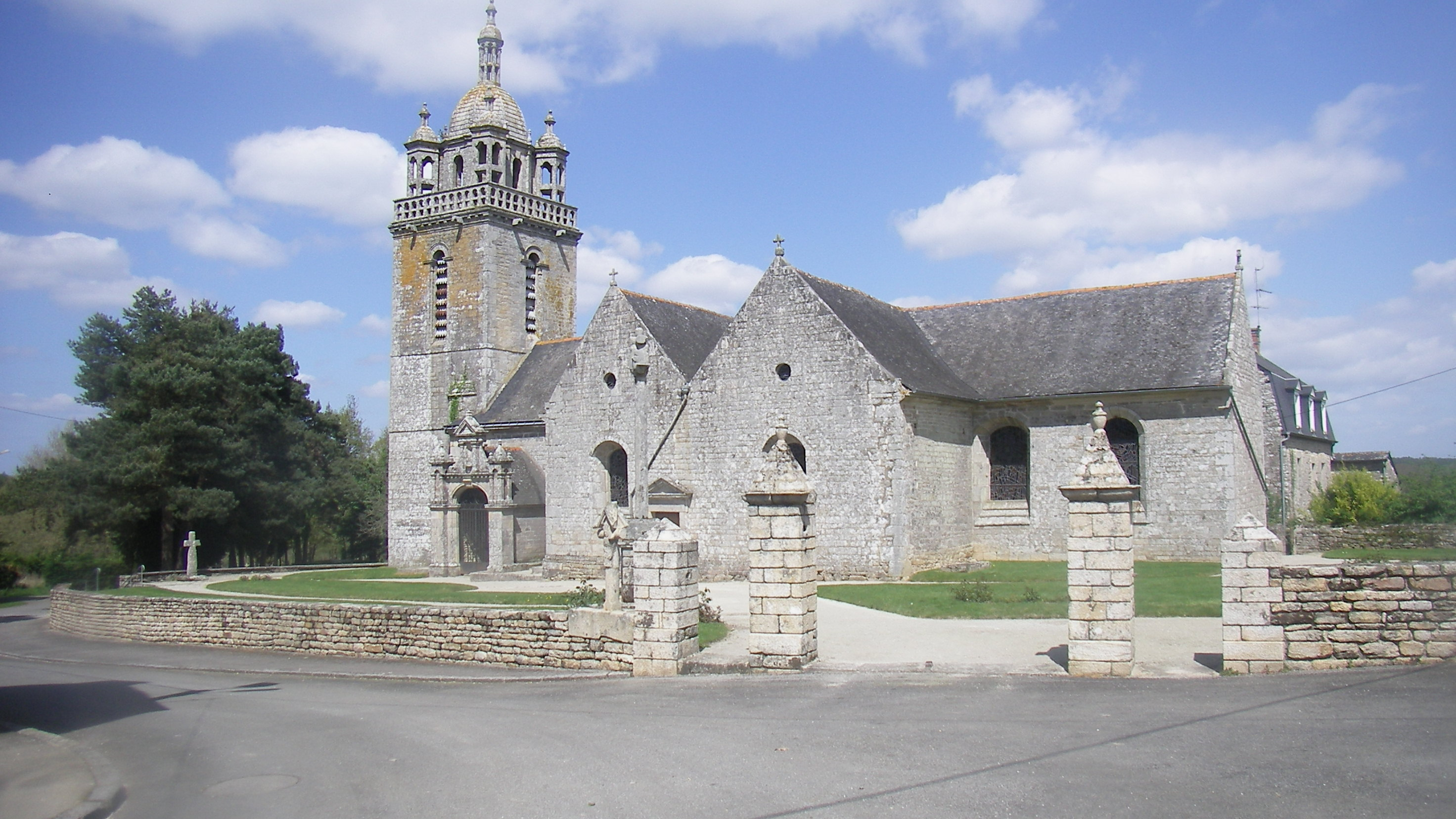 Photographie représentant l'église de St Servant